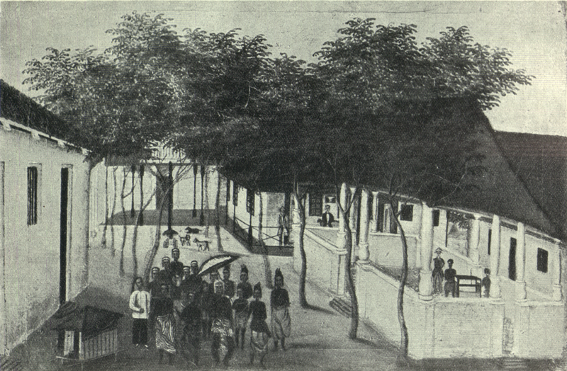 Indenfor murene. Gruppen i forgrunden forestiller sandsynligvis den gamle hvidhaarede rajah Kassiman med Følge. Man ser den kongelige parasol og bærestol. På forgalleriet i baggrunden ses Mads Johansen Lange.